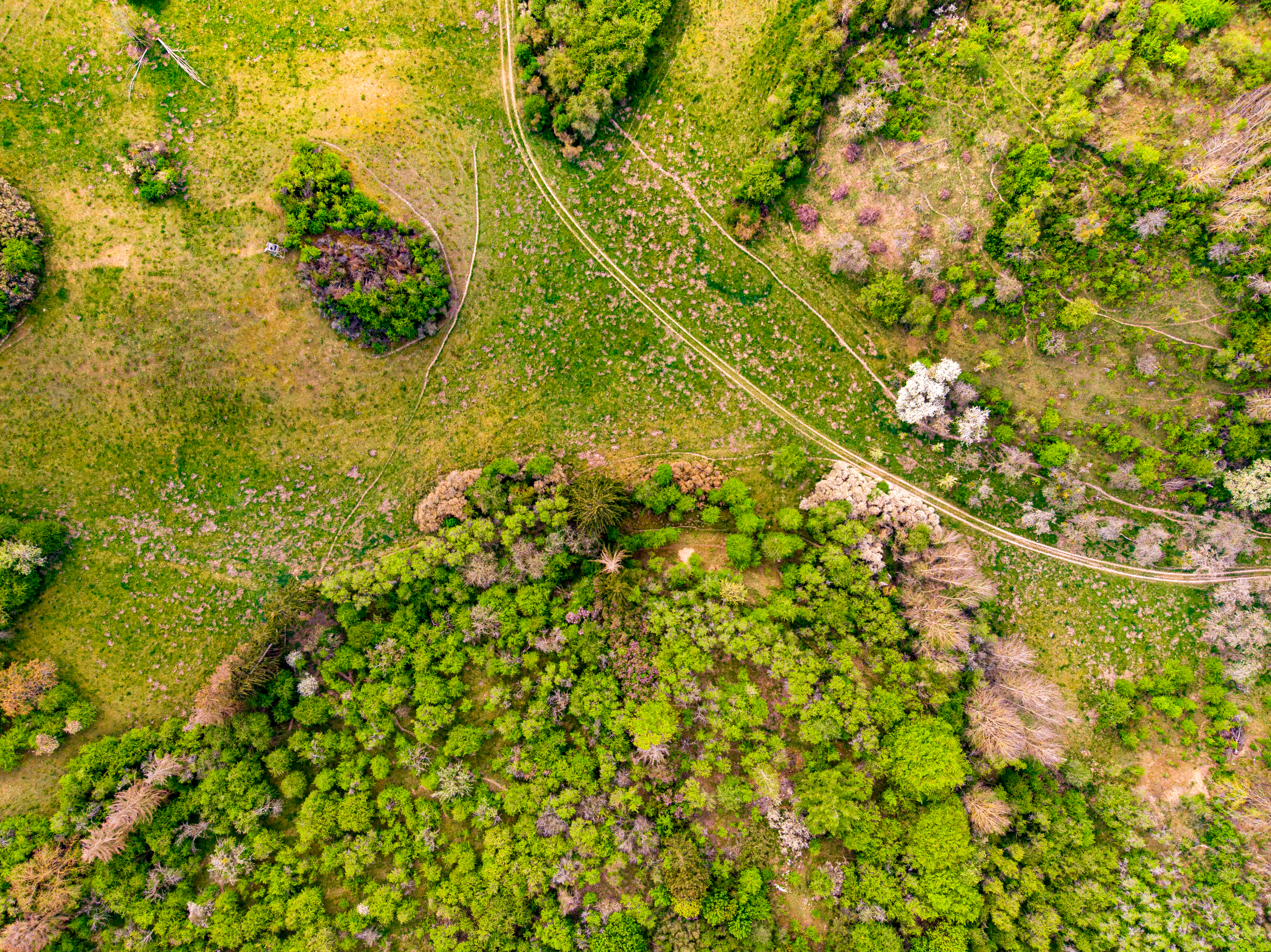 Falkenberg